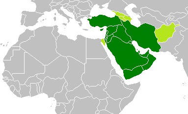 Передняя Азия, в приближении к государственным границам. По БСЭ.